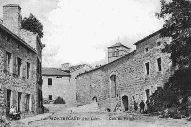 Montregard dans le passé (rue du Lizieux )